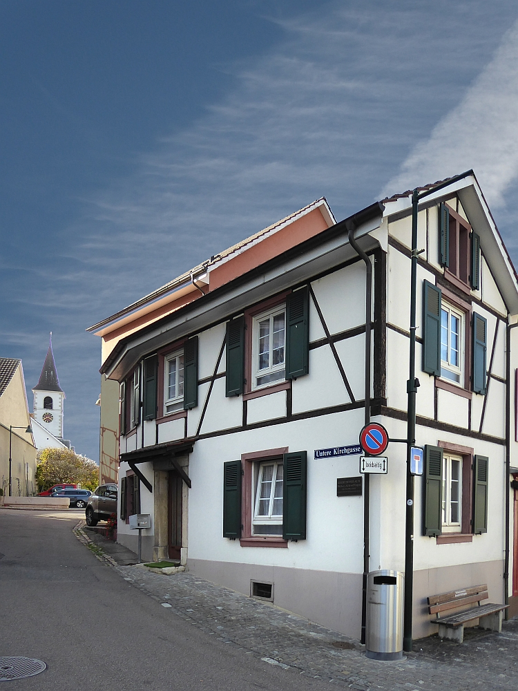 Geburtshaus von Alfred Vogel in Aesch, Basel-Land. Schweizer Heilpraktiker, Pionier, Unternehmer